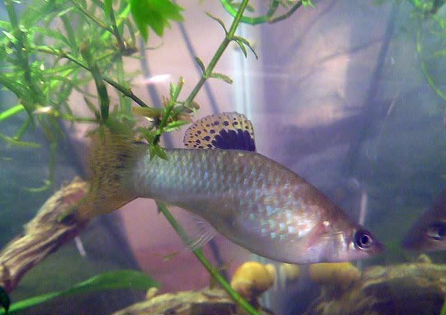 Poecilia gillii es un pez de la familia de los pecílidos en el orden de los ciprinodontiformes.